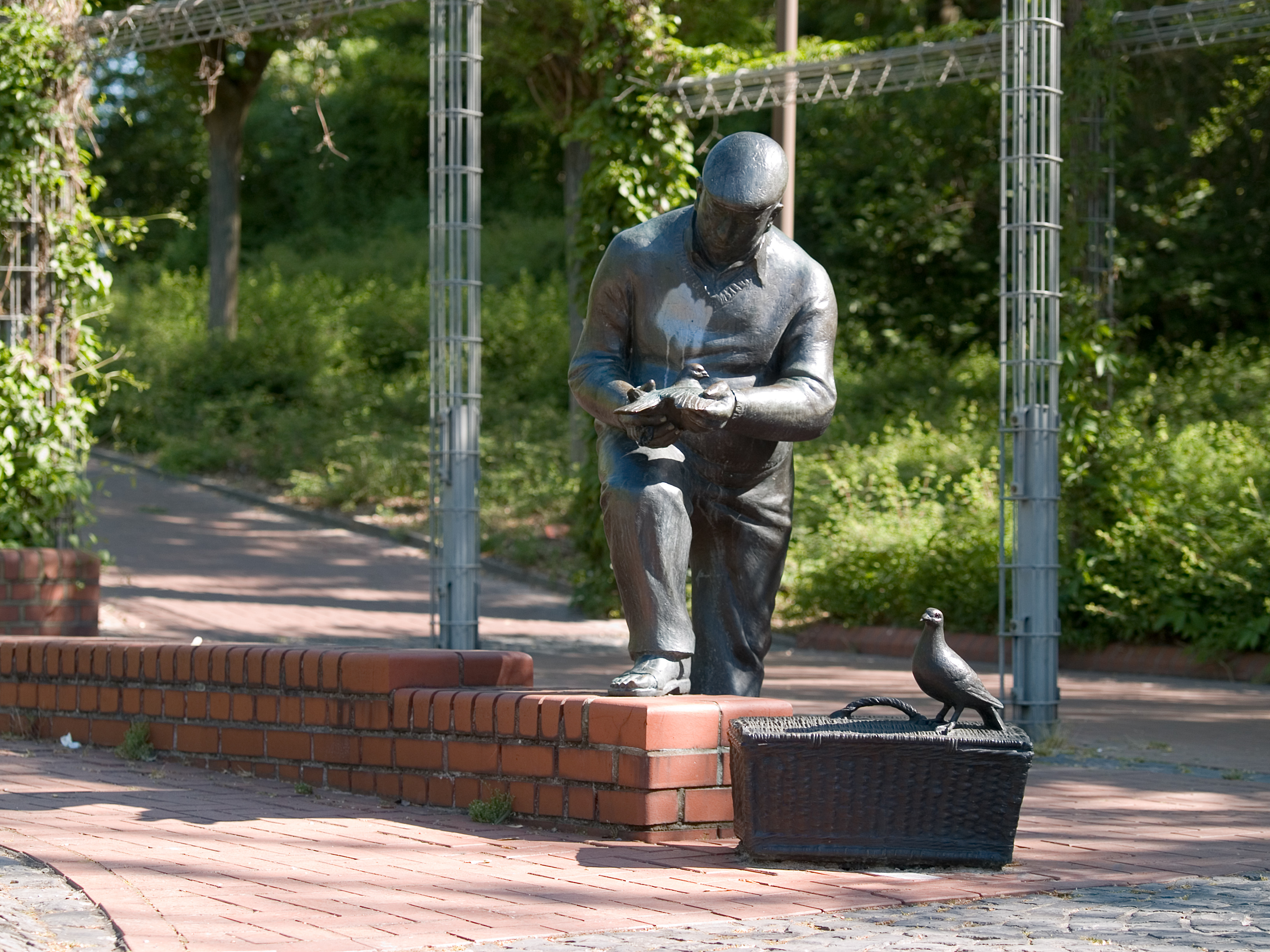 Teil des dreiteiligen Taubenvatter-Denkmals in Castrop-Rauxel. Das Halten von Brieftauben war eine beliebte Freizeitbeschäftigung der Bergleute im Ruhrgebiet